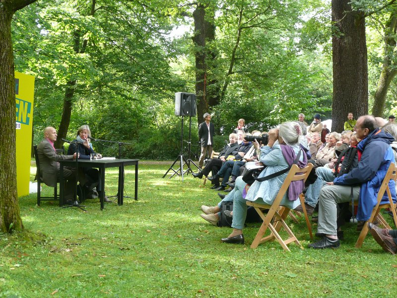 Der Schriftsteller Georg Klein im Gespräch mit der Kritikerin Verena Auffermann auf einem Nebenpodium beim Erlanger Poetenfest 2010.